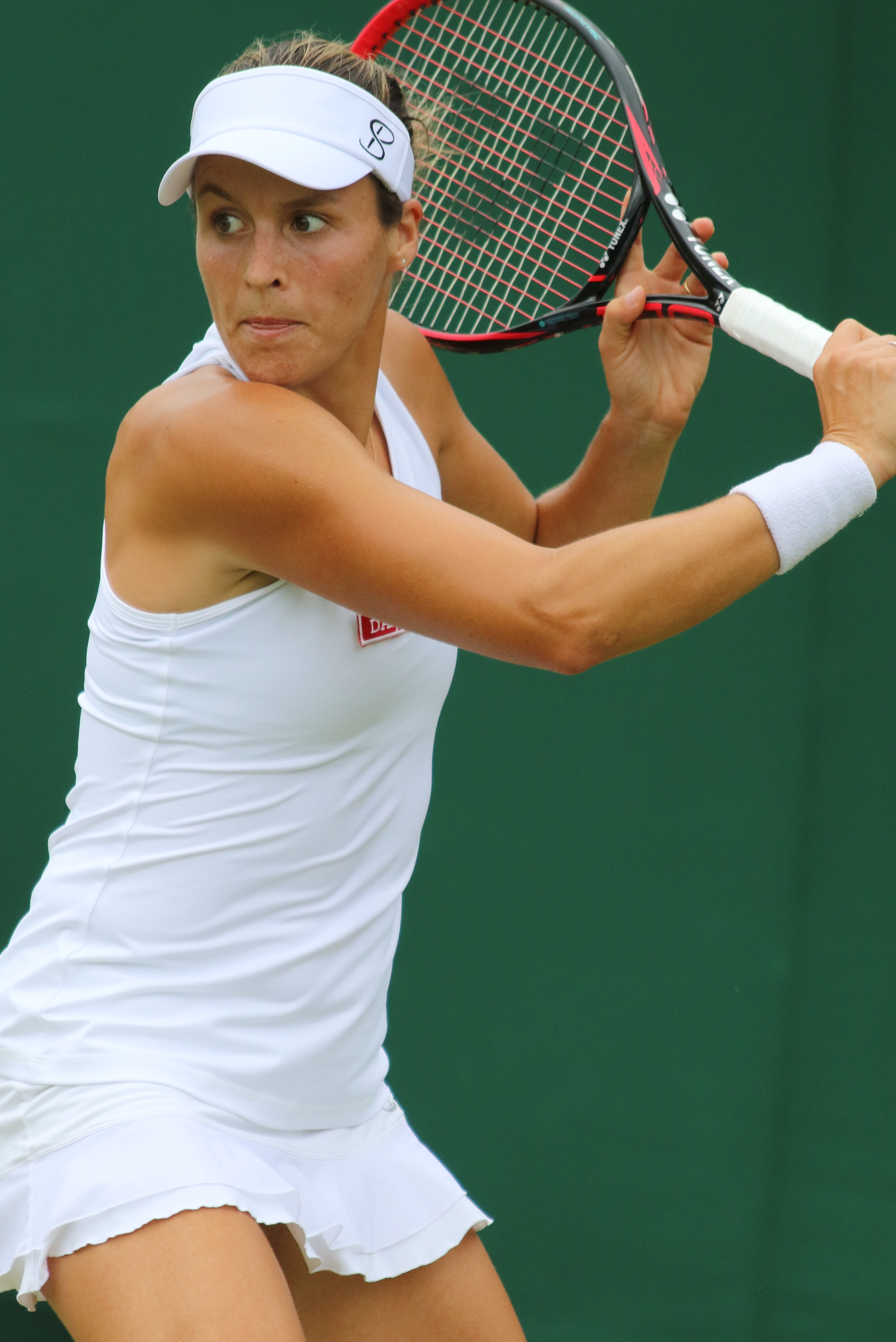 Maria WM17 (9)